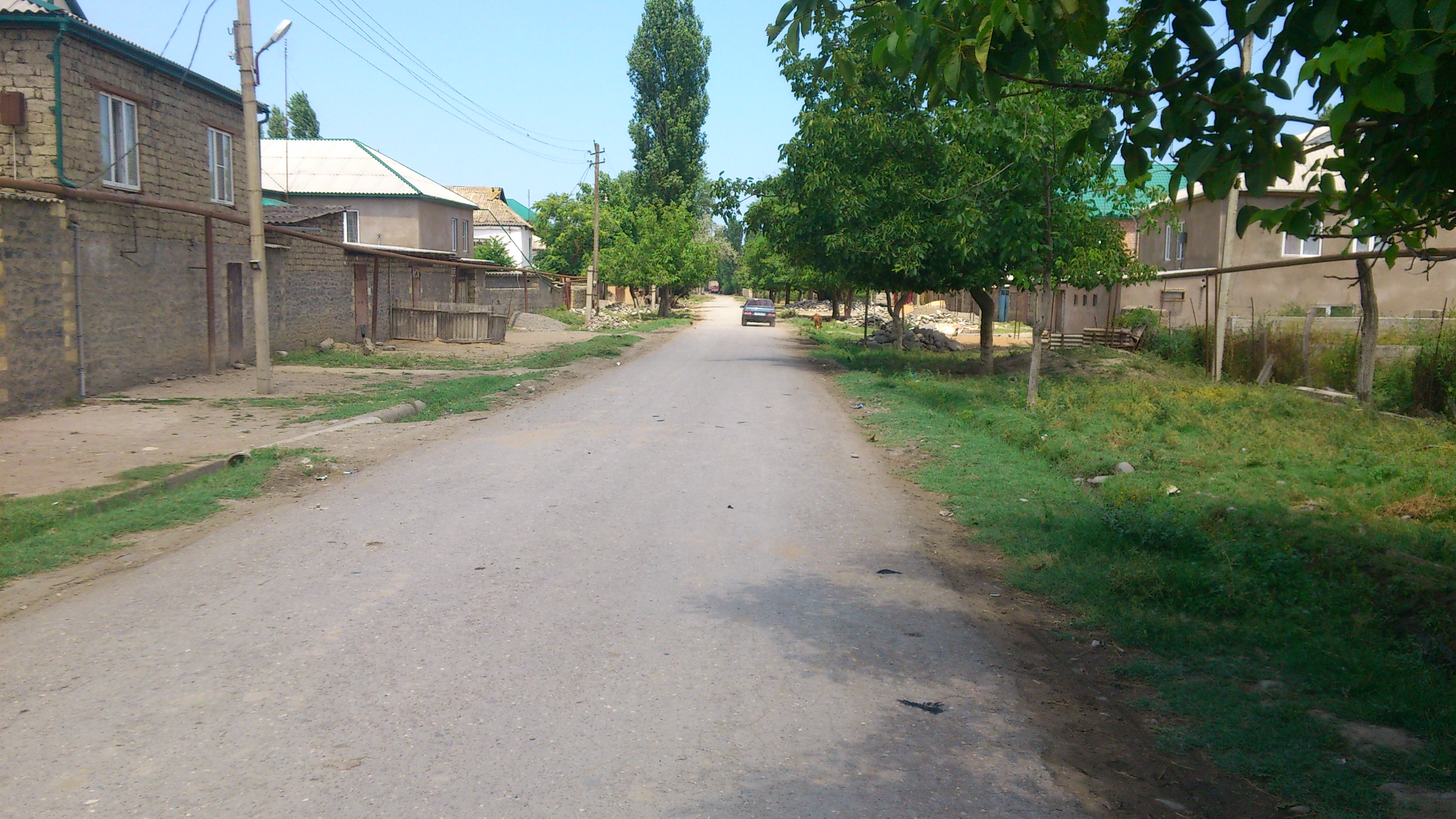 вторая улица